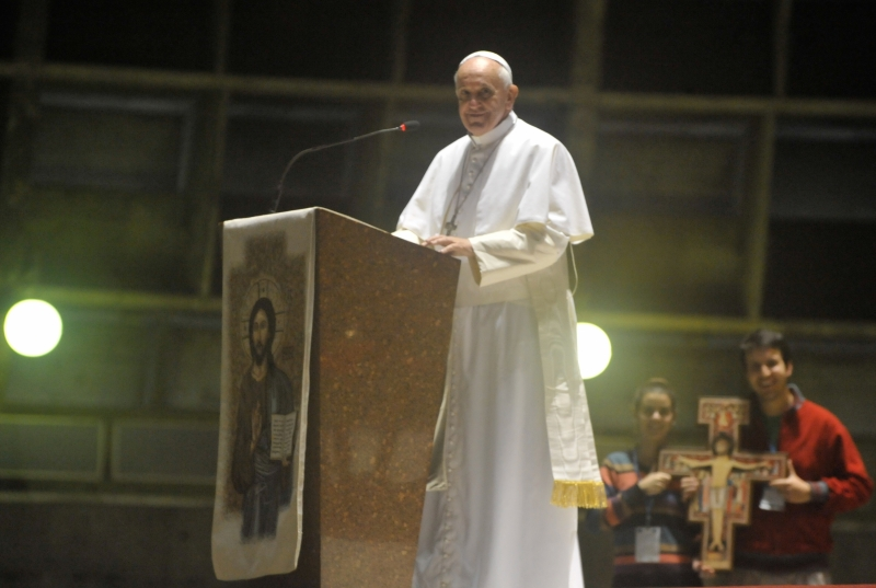 Francisco dando un discurso durante el encuentro con jóvenes argentinos de la JMJ 2013